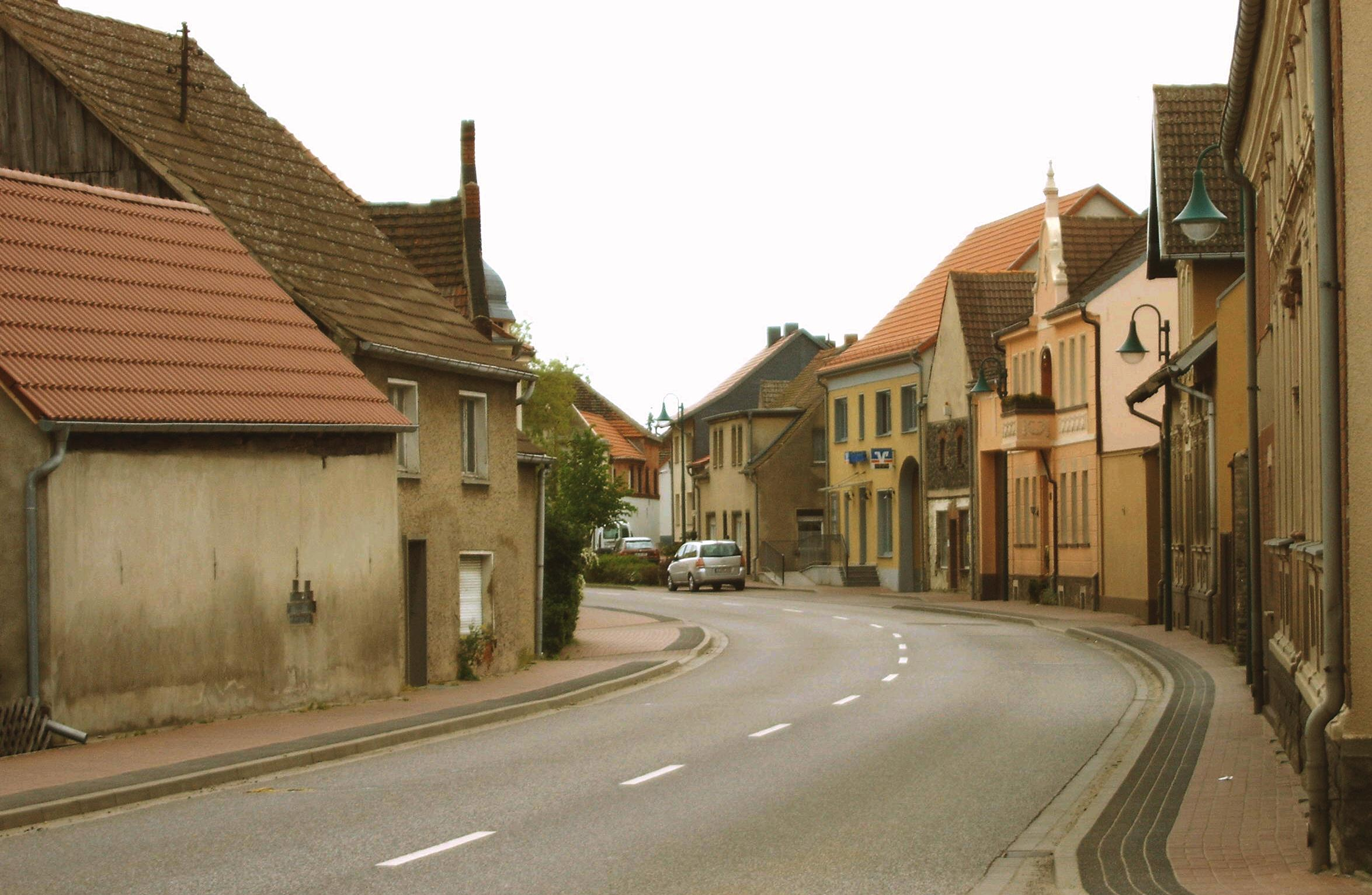 new version of Image:Tucheim Hauptstraße.jpg Hauptstraße durch Tucheim, Deutschland Bild aufgenommen am 22.5.2006 durch Olaf Meister upgraded of Picman Licensing